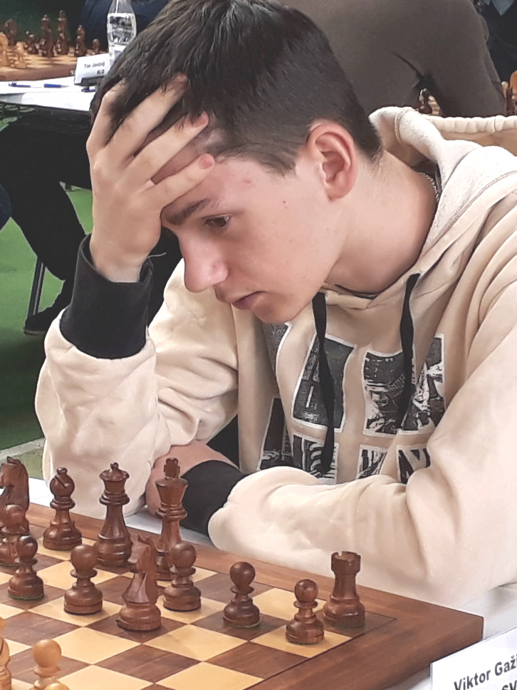 Viktor Gazik, Runde 4 Mitropa Cup 2019 in Radenci.